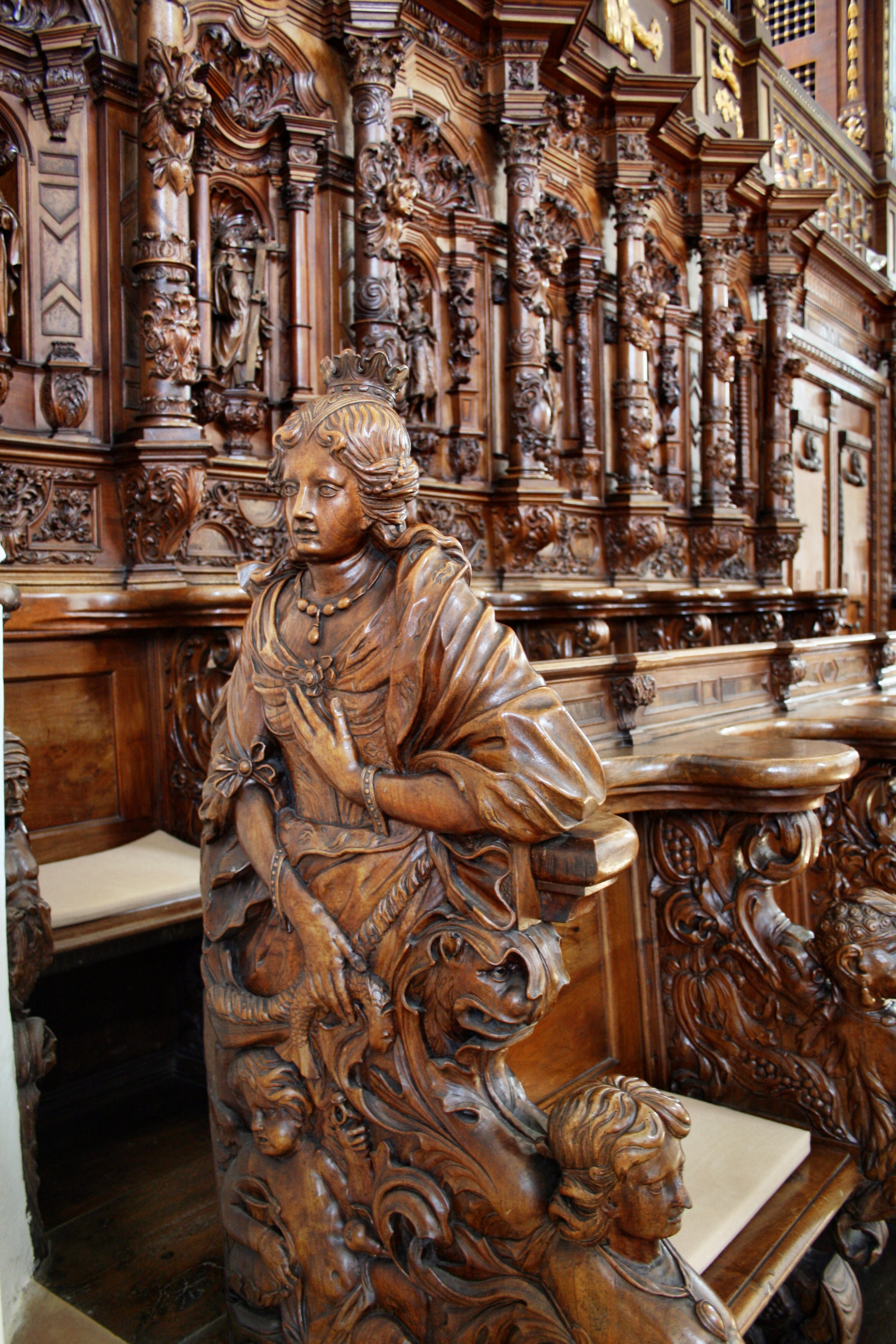 St Verena, Rot an der Rot: Hl. Verena